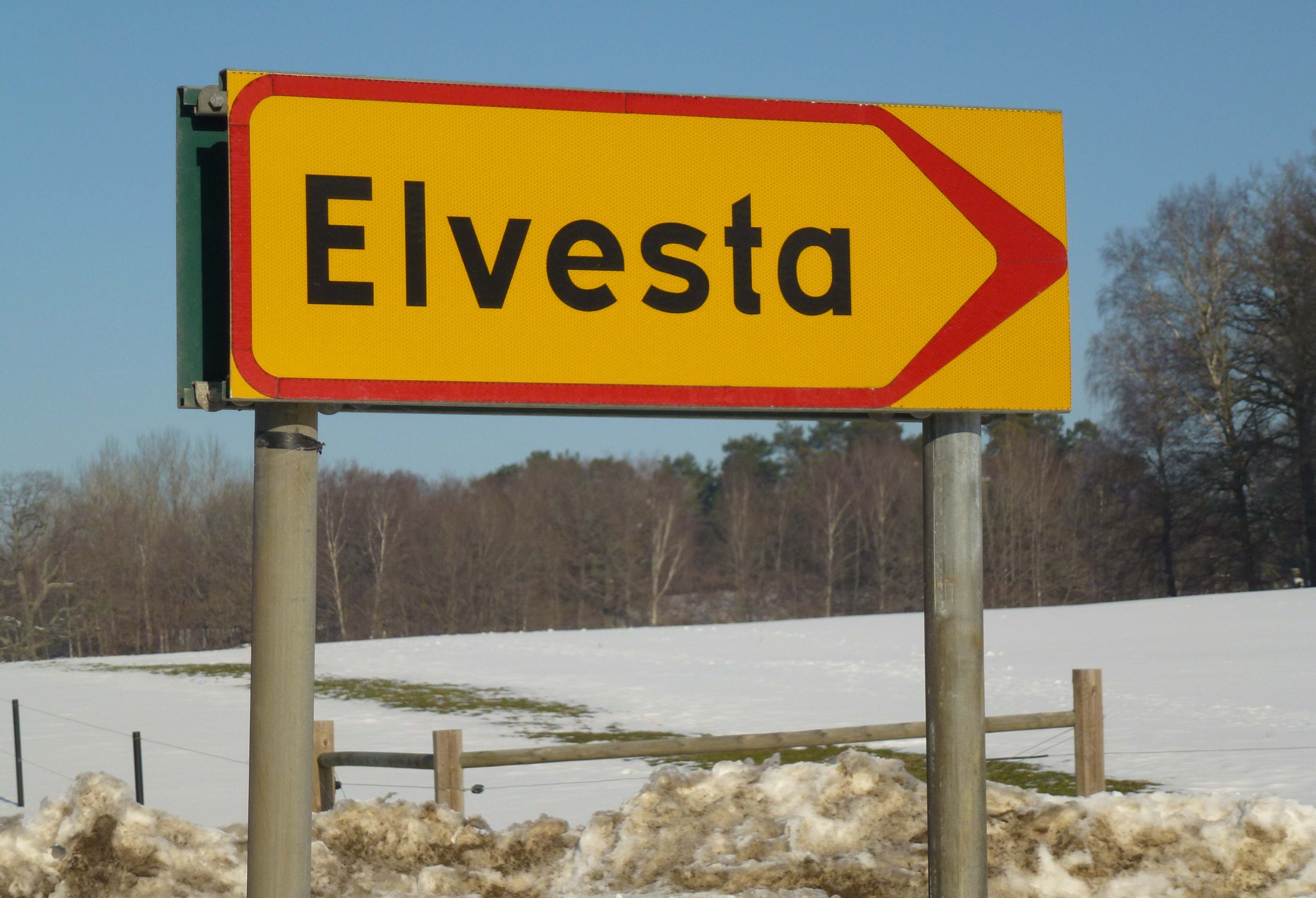 Elvesta skylt